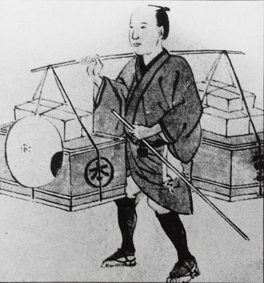 近江商人、初代細田善兵衛の行商像。天秤棒を肩にかけ、行商をした。